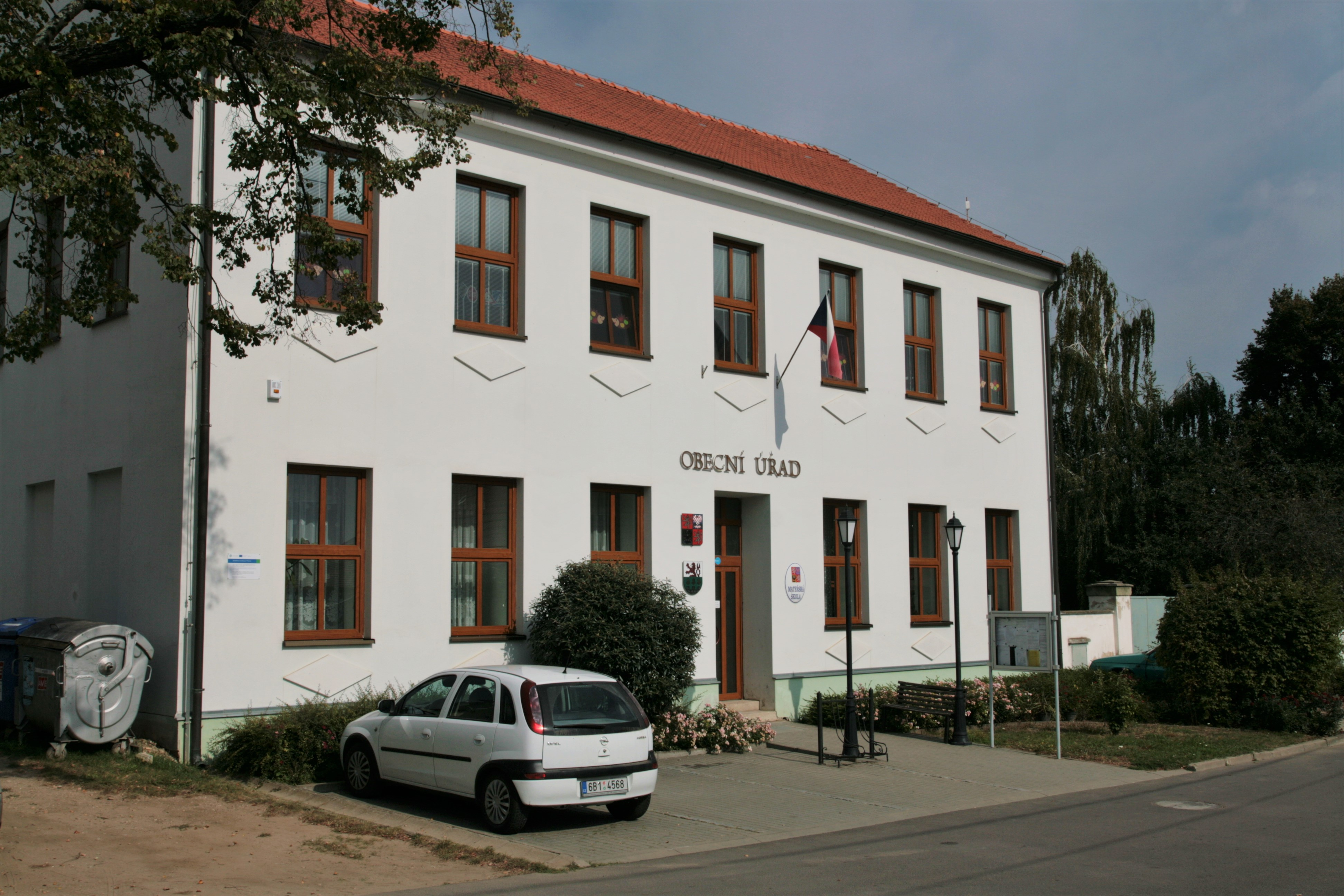 Obec Pravice v okrese Znojmo. Obecní úřad vedle kostela.